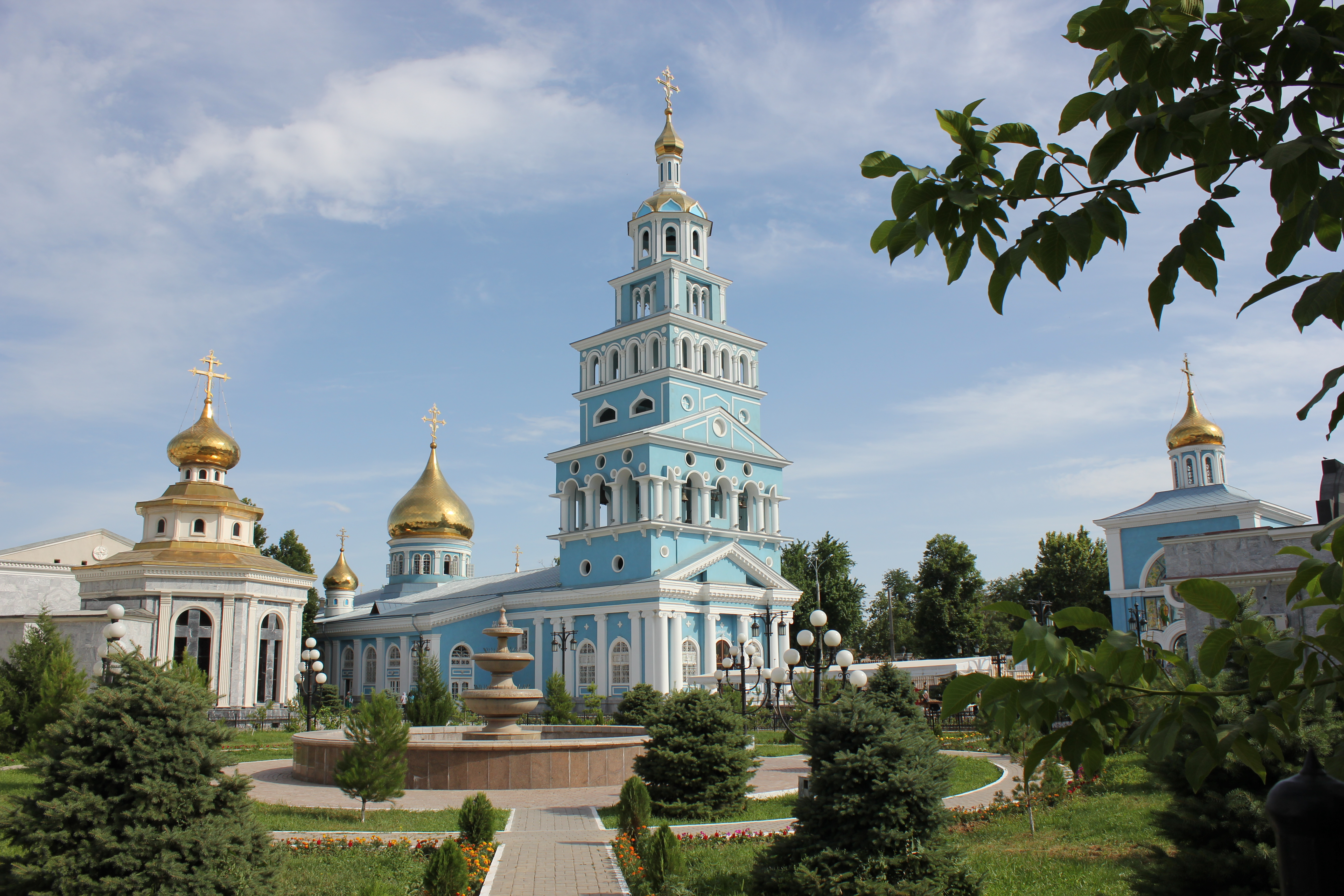 Успенский кафедральный собор в Ташкенте